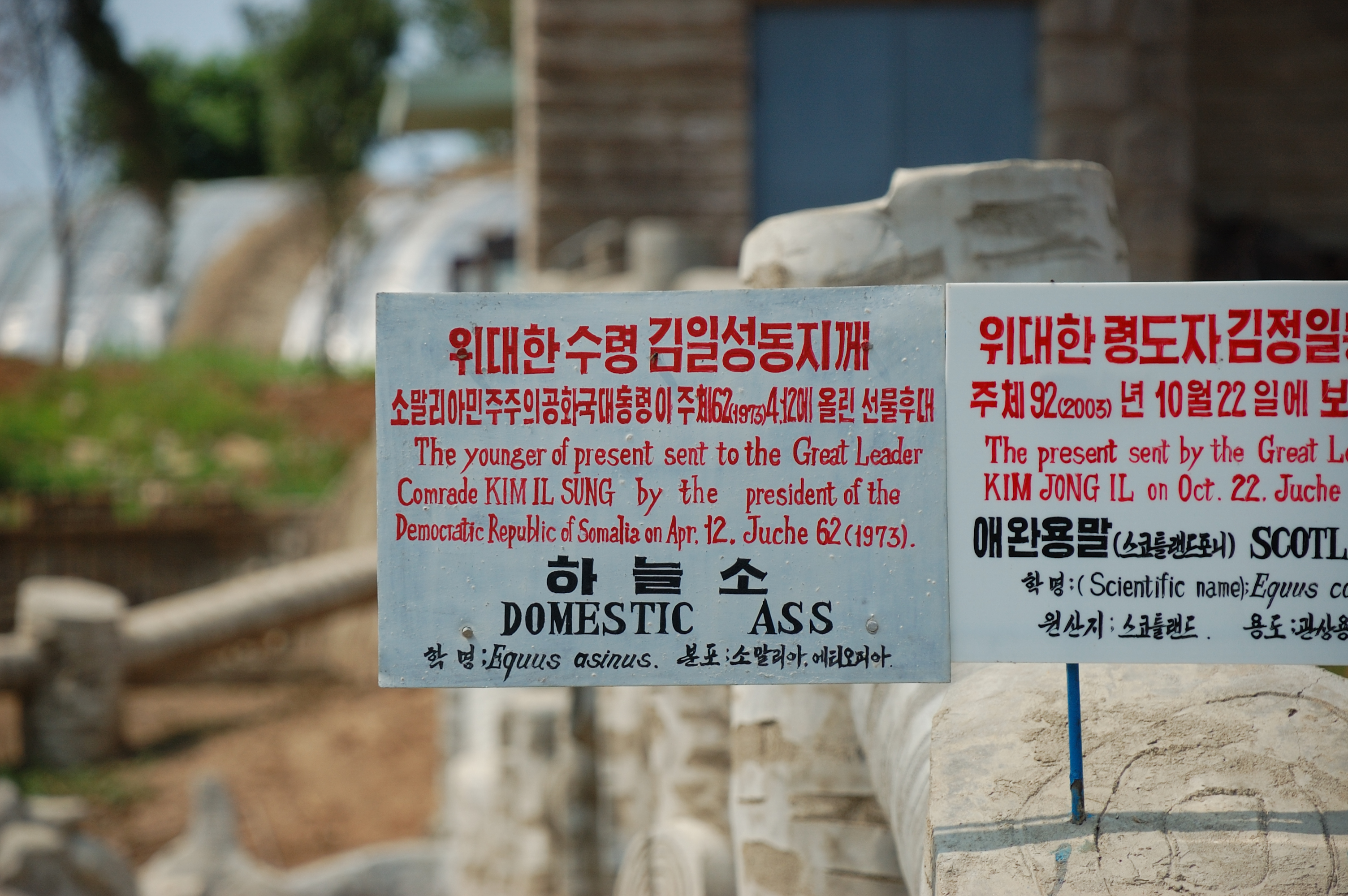 Pyongyang Zoo, North Korea.